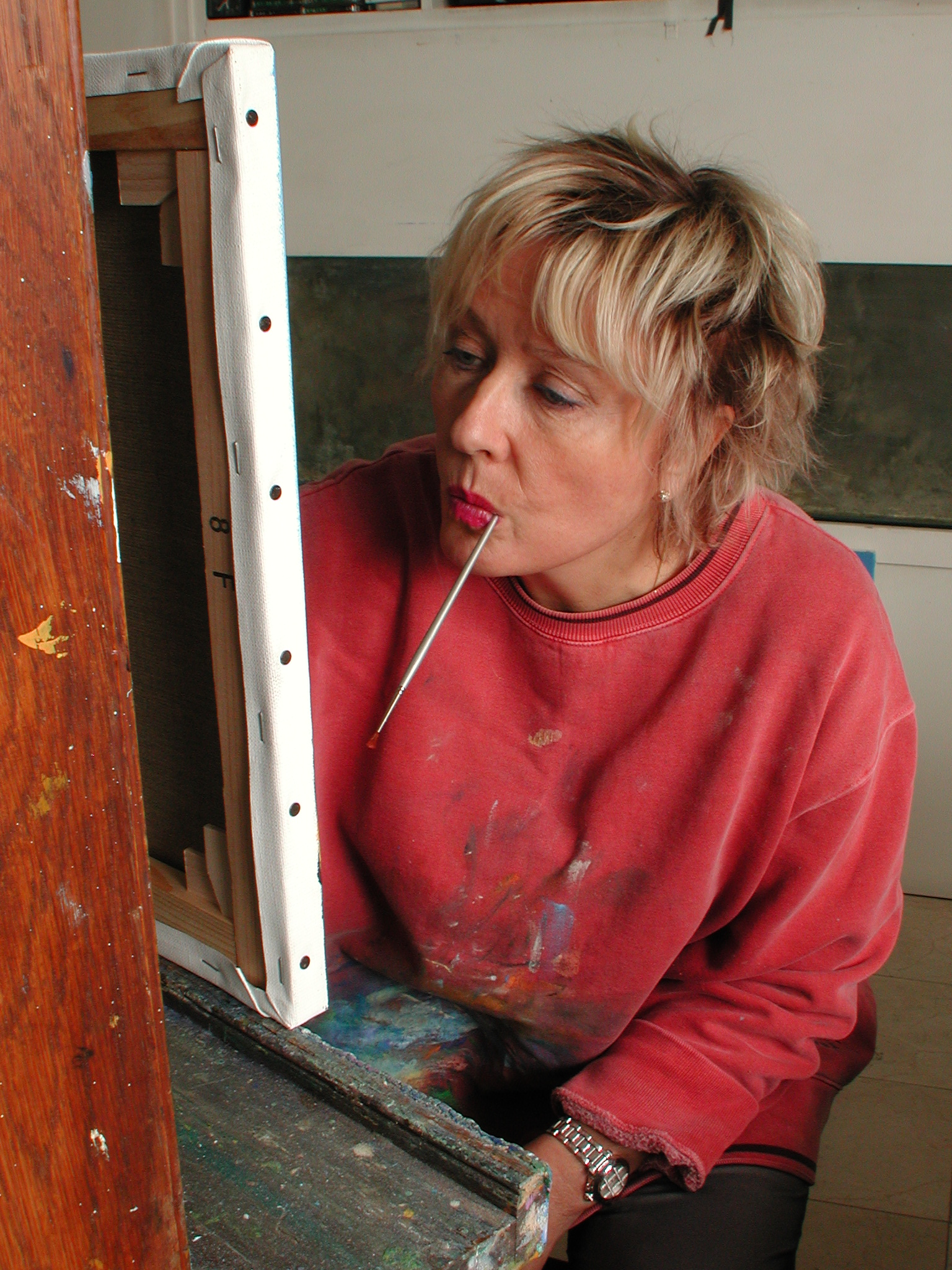 portrait